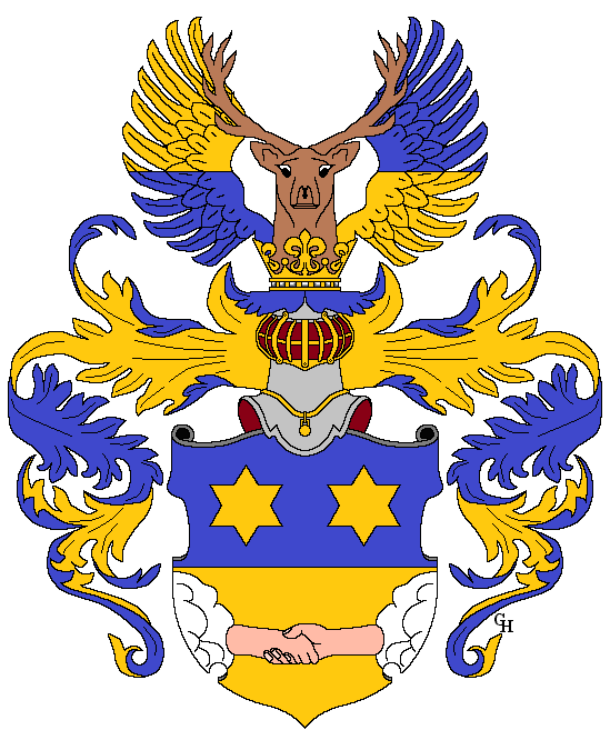 Wappen des böhmisch-österreichischen Großindustriellen (Kattundruckereibesitzer) Moses Gabriel Porges (1781–1870), verliehen anlässlich seiner Erhebung in den österreichischen Adelsstand als "Edler von Portheim" am 5. Juni 1841. (Am selben Tag wie Moses Gabriel erhielt sein Bruder Juda Leopold Porges (1785–1869) ebenfalls den österreichischen Adelsstand als "Edler von Portheim", allerdings führte dieser anstatt des Hirschen eine wachsende Rose im Wappen.) Zeichnung von Gerd Hruška ( Für weitere Informationen zu dieser Standeserhebung siehe (